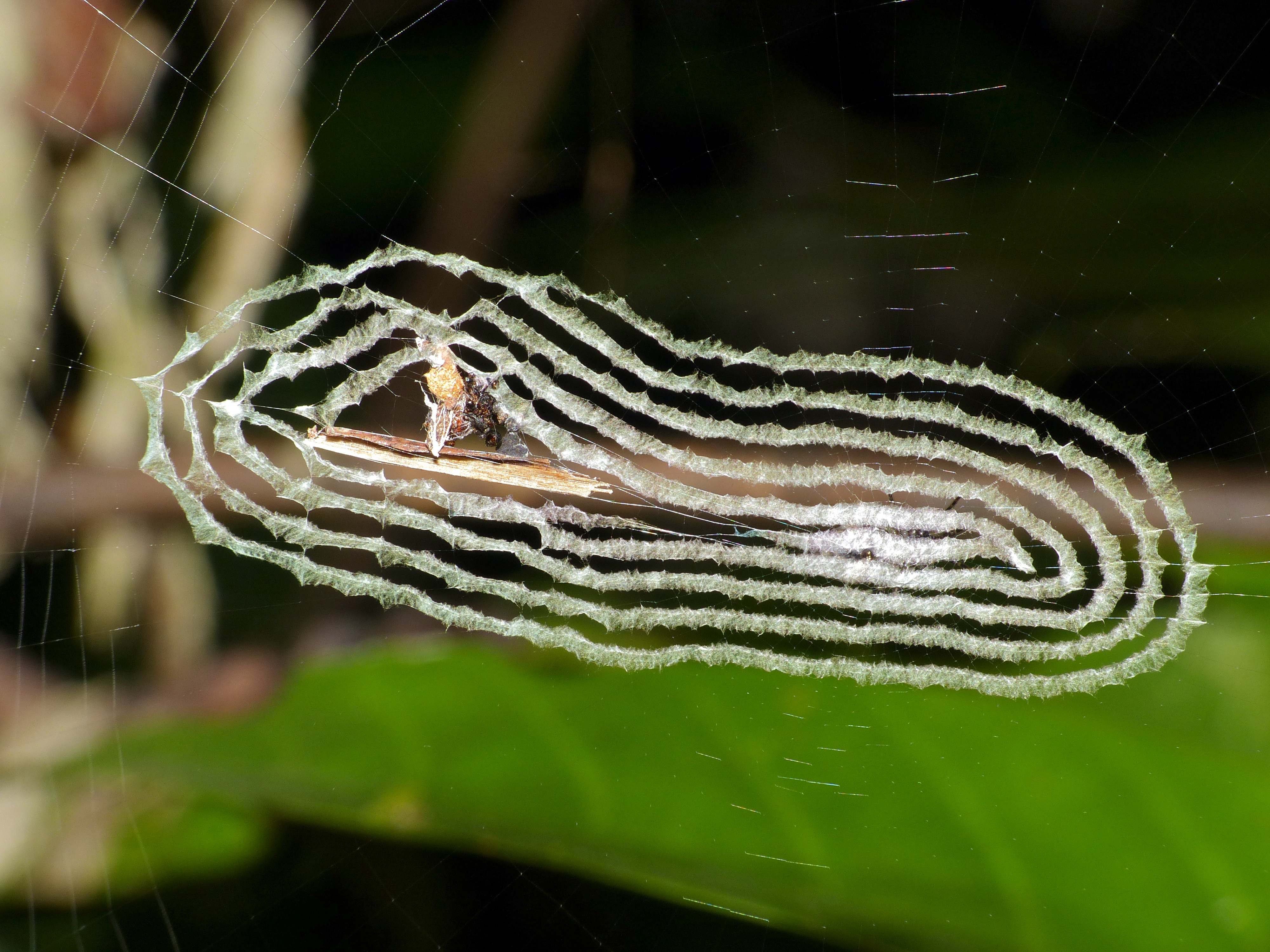 Botanic Trail, Mulu NP, Sarawak, MALAYSIA